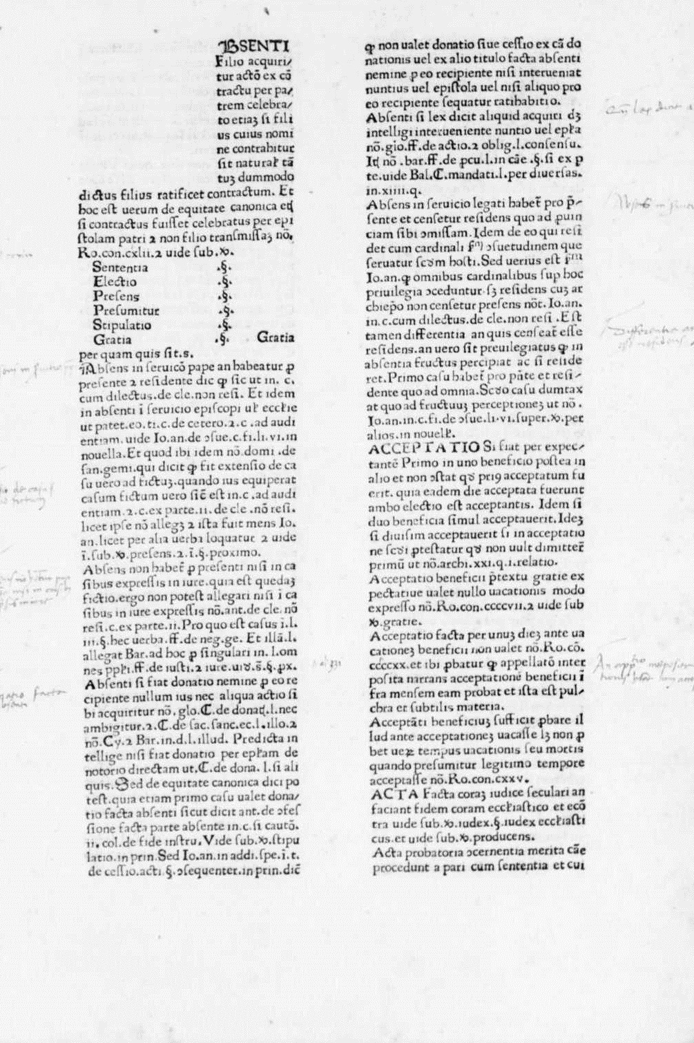 Carta a3r